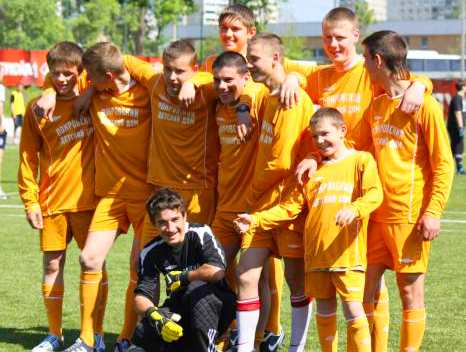 Мини-футбольная команда "Покровского детского дома" на турнире "Красно-белое сердце". 2011 год